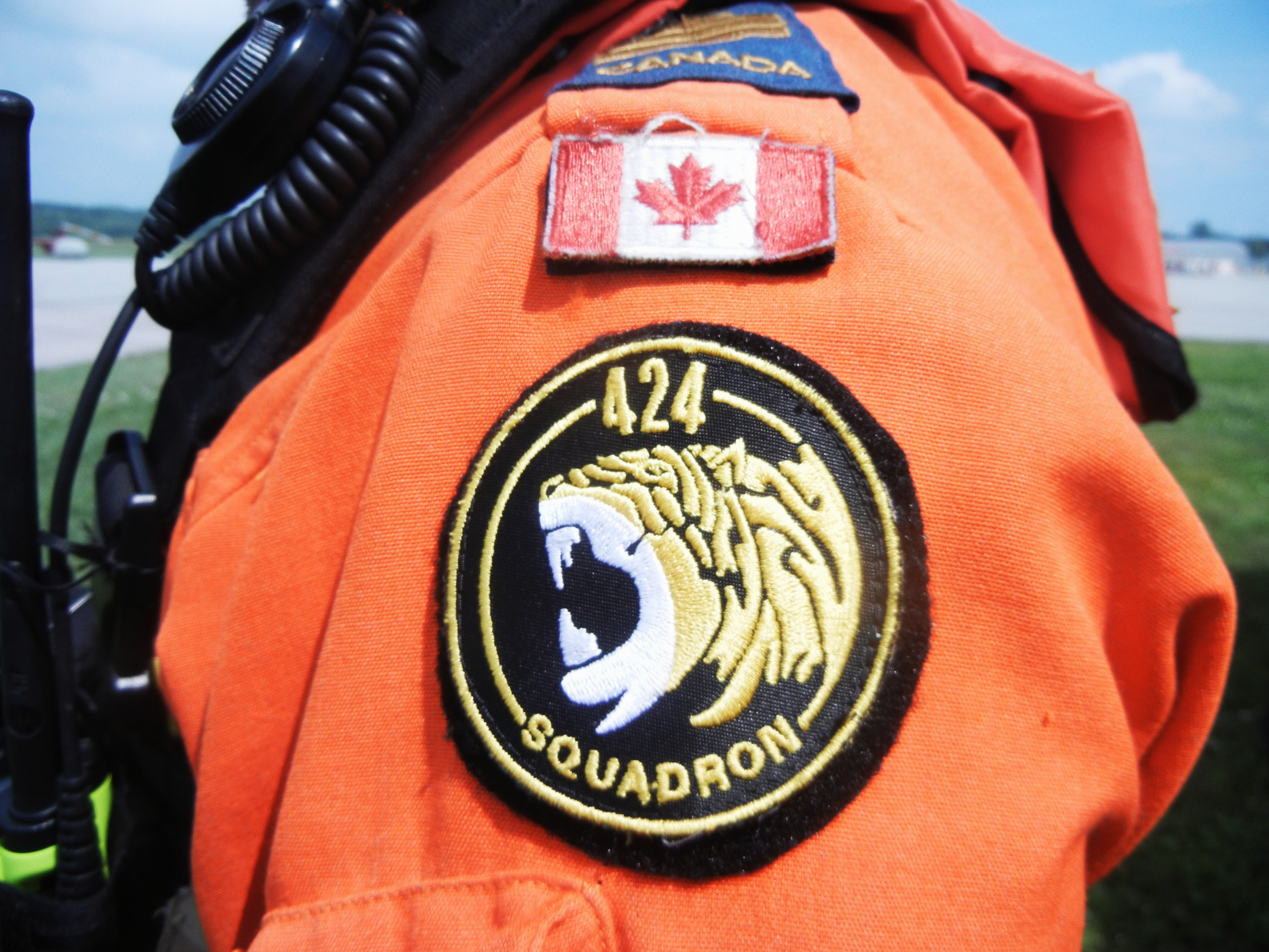 écusson sur équipement SARTEC